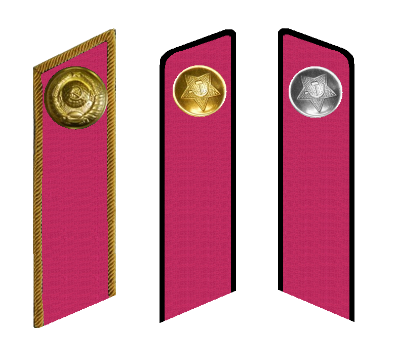 Петлица милиции МГБ